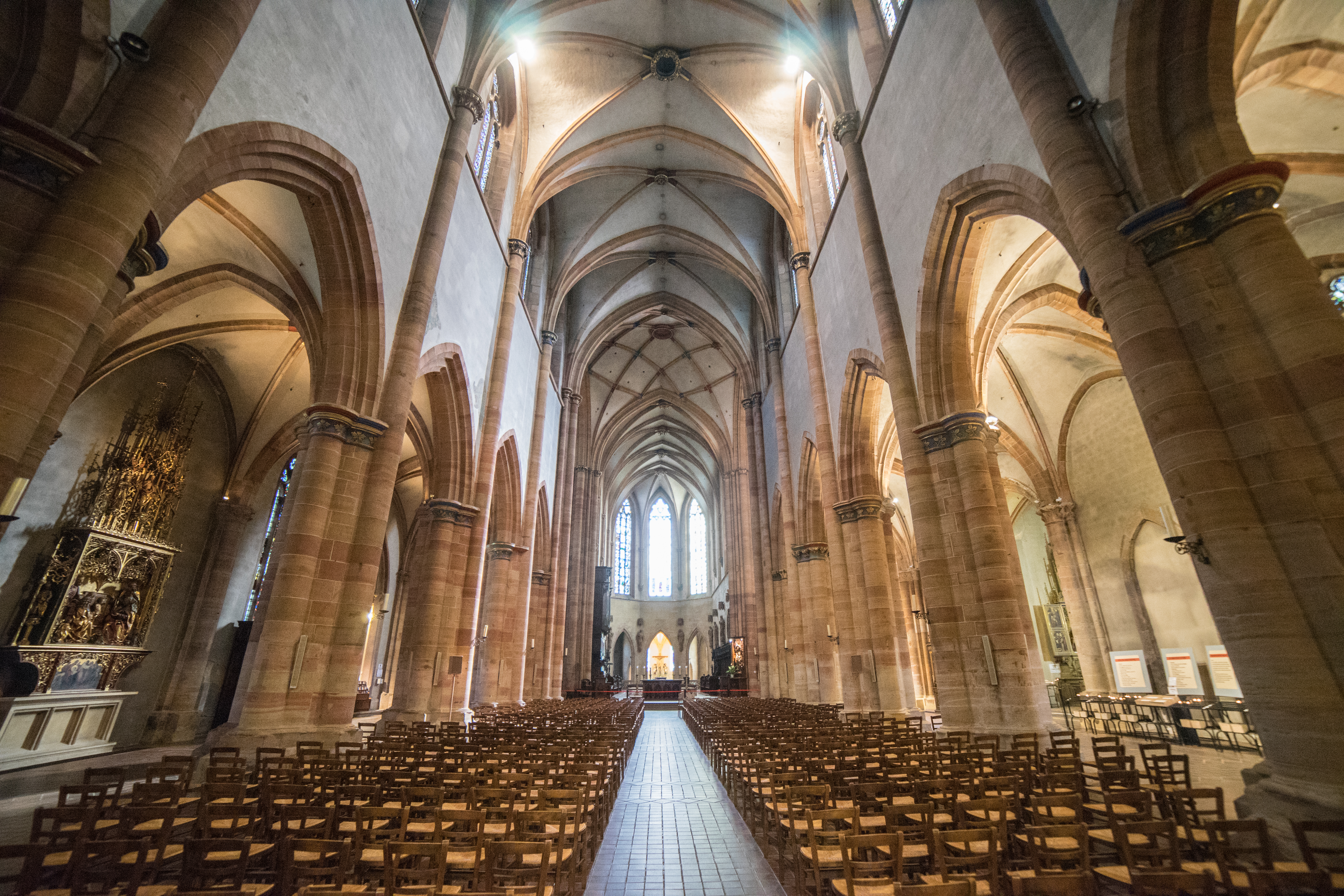 Colegiata de San Martin en Colmar .